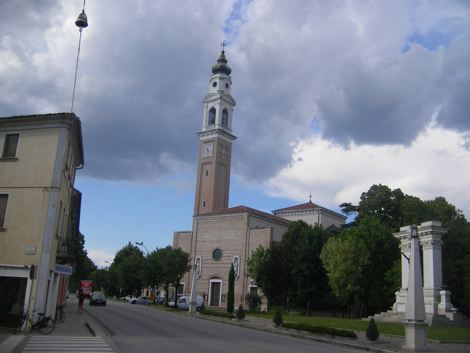 Spresiano